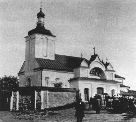 Беларуская (тарашкевіца): Новы Сьвержань (Novy Śvieržań), рог пляцу Рынку (plac Rynak) і вуліцы Менскай (vulica Mienskaja). Царква Прачыстай Багародзіцы